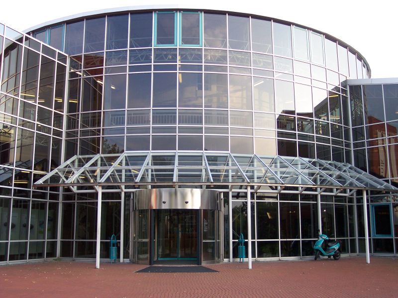 Deutsche Arbeitsschutzausstellung (DASA), Dortmund